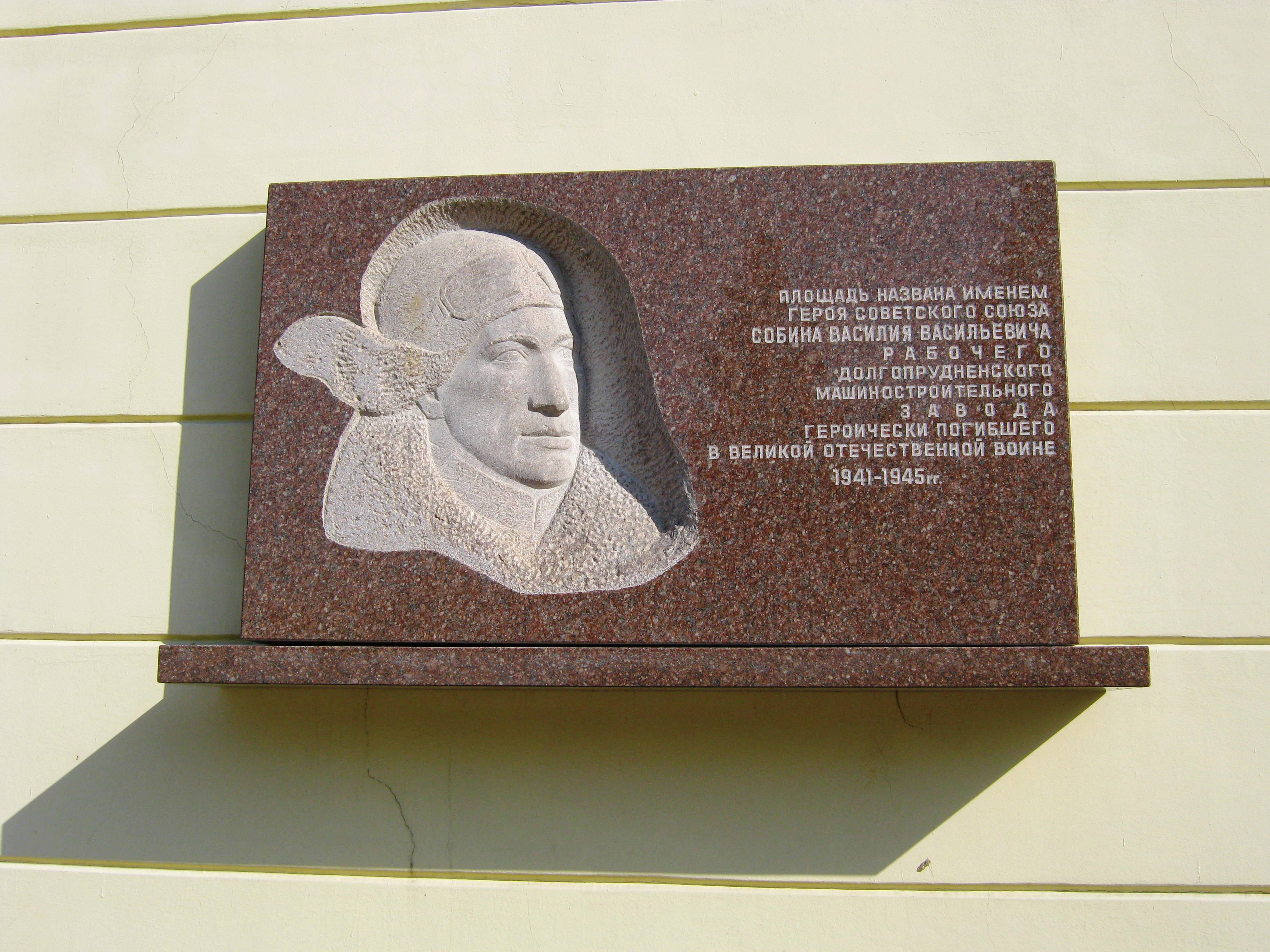 Мемориальная доска Собину в Долгопрудном